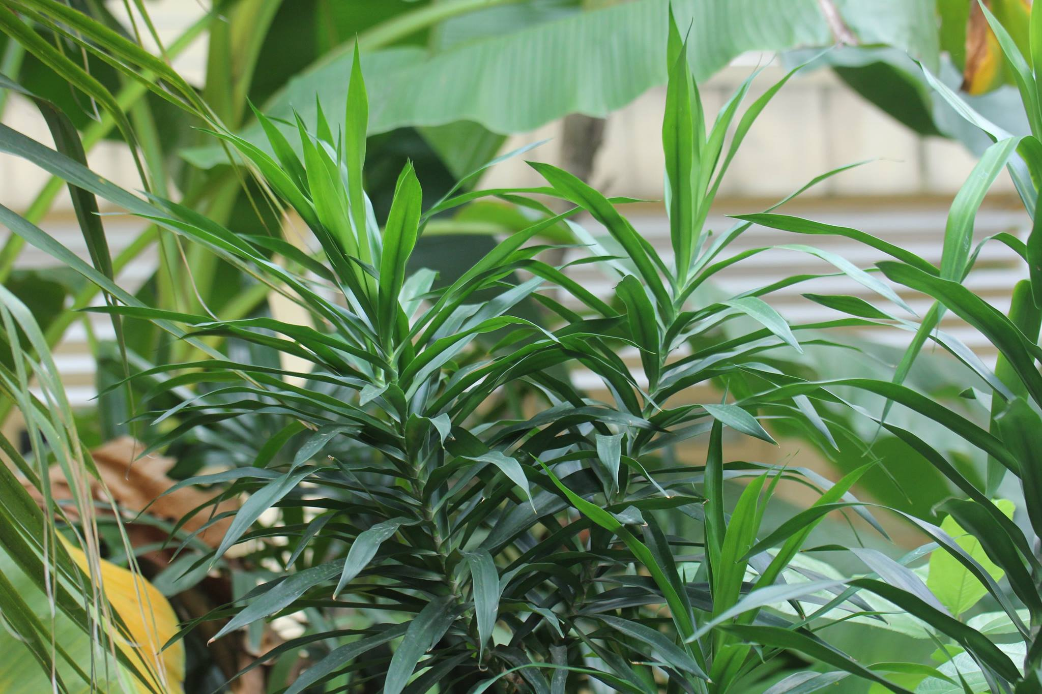 cây bồng bồng